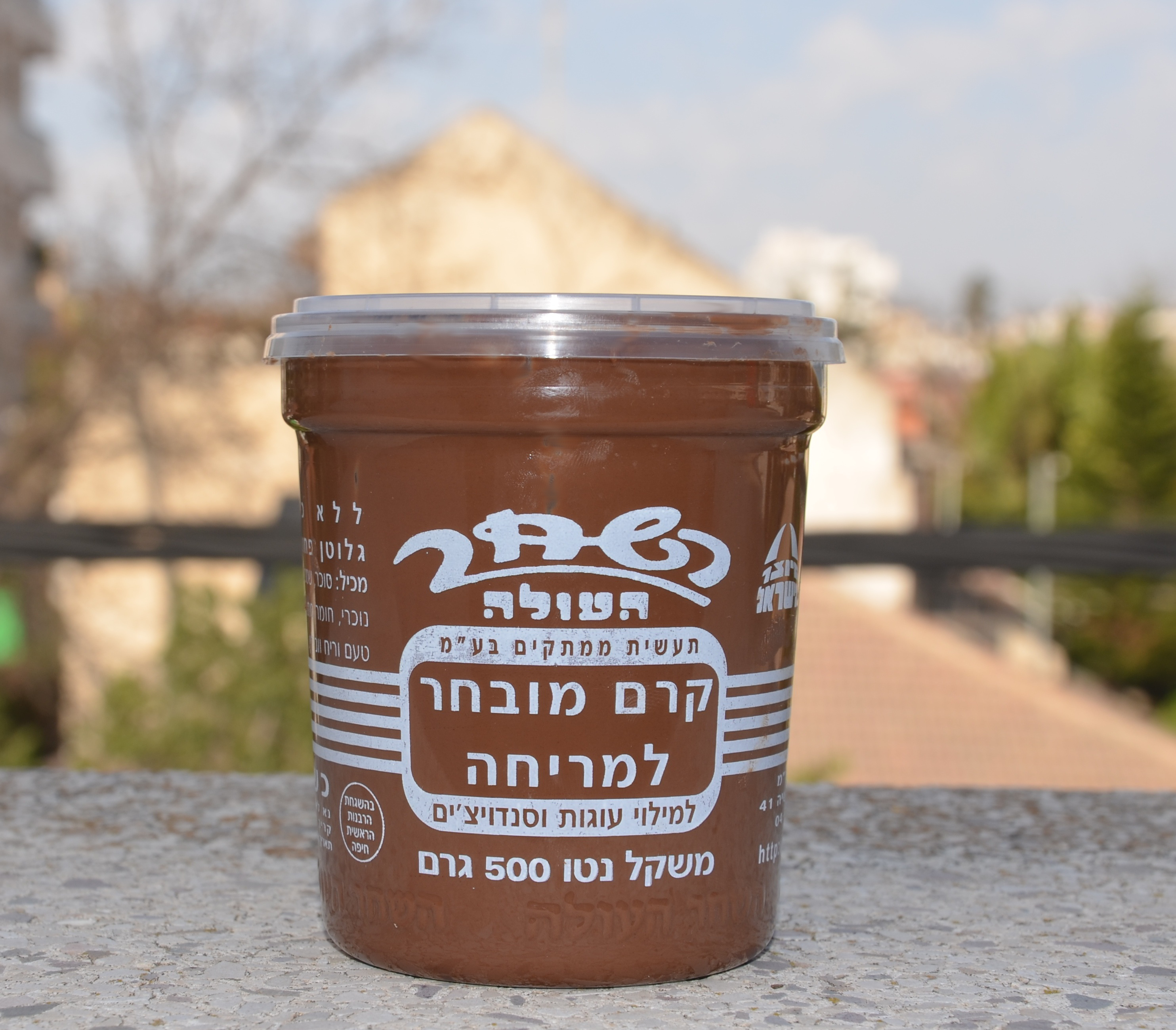 Ein Bild der israelischen Schokoladencrem "Schokolad Haschachar"